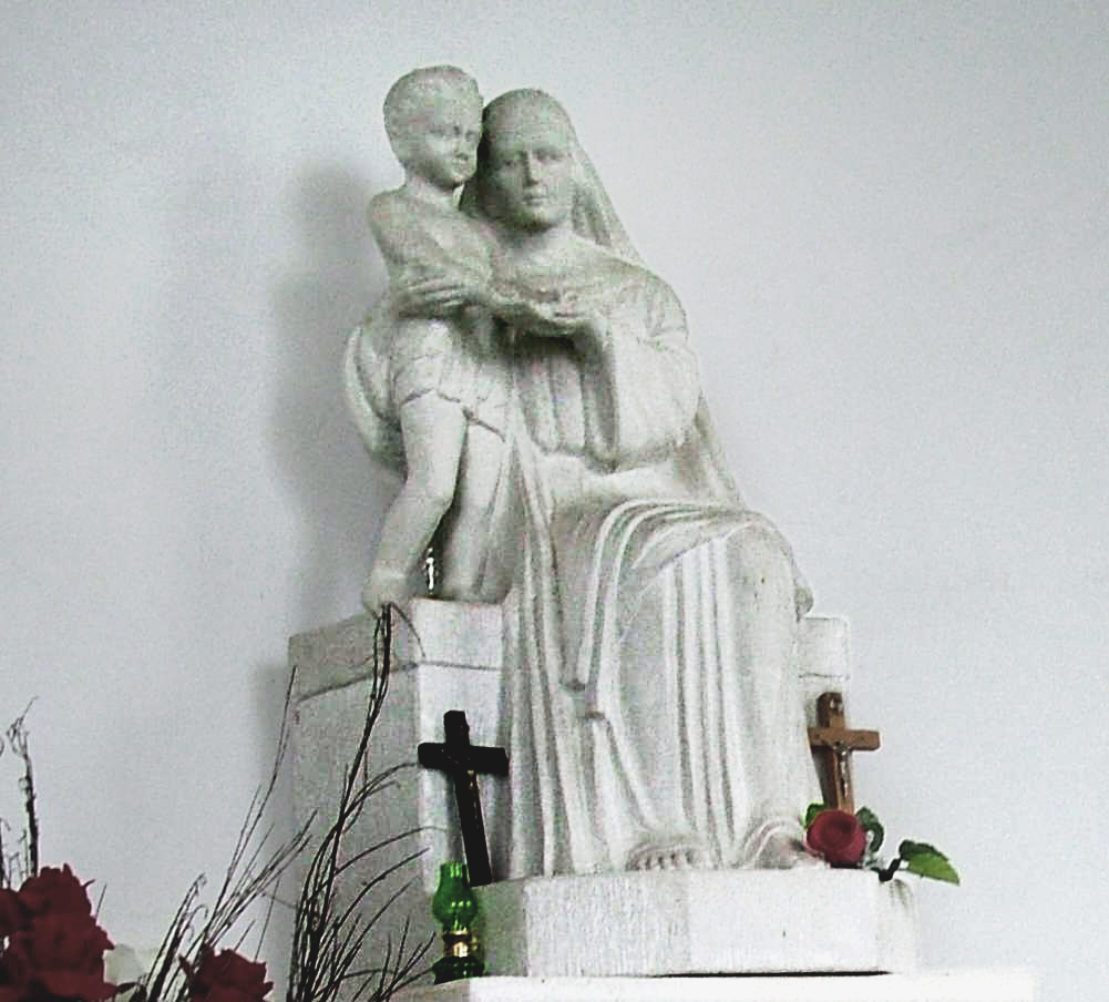 Rzeźba autorstwa Luny Drexlerówny w kaplicy Cmentarza Obrońców Lwowa, maj 2005, autor: Stanisław Kosiedowski